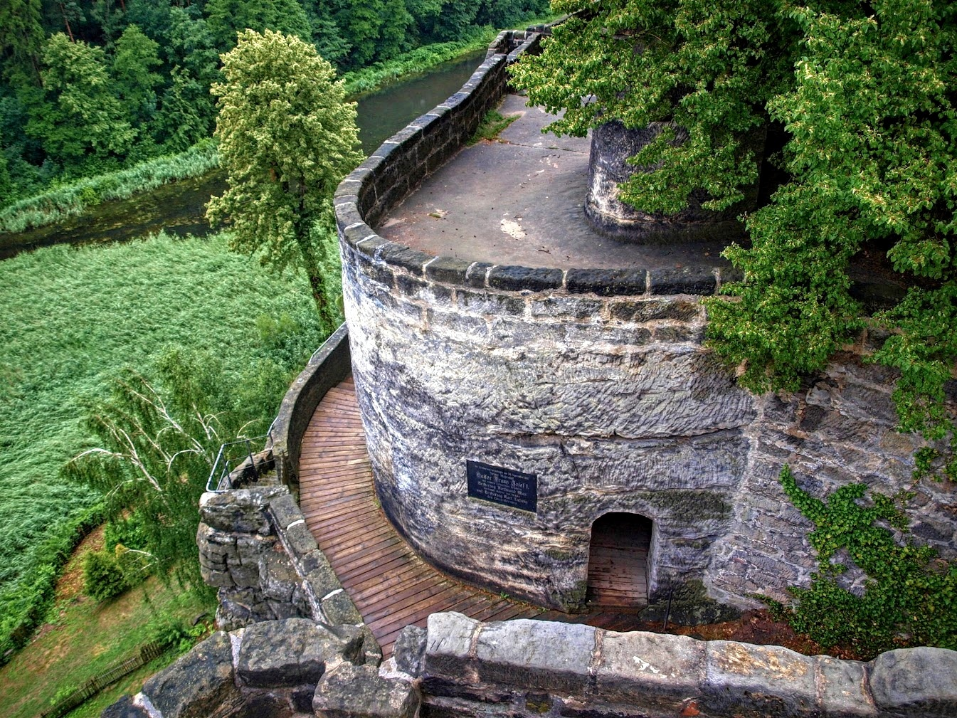 Sloup, skalní hrad